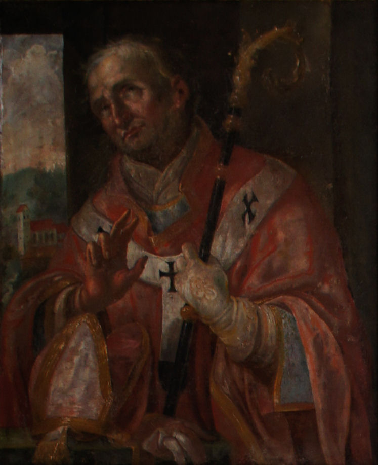 Porträtgemälde von Erembert, Bischof von Freising, im Fürstengang zwischen Fürstbischöflicher Residenz und Freisinger Dom.